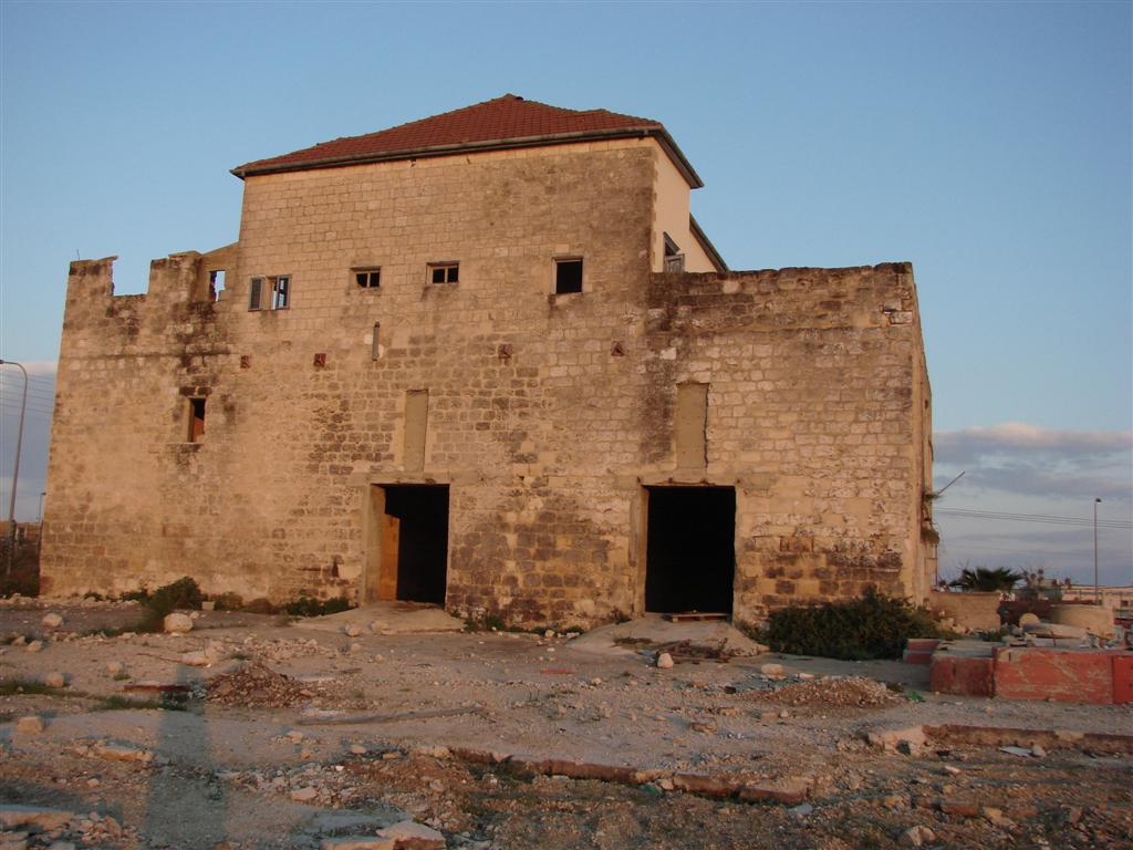 חאן רמת ישי - צד מערב 1